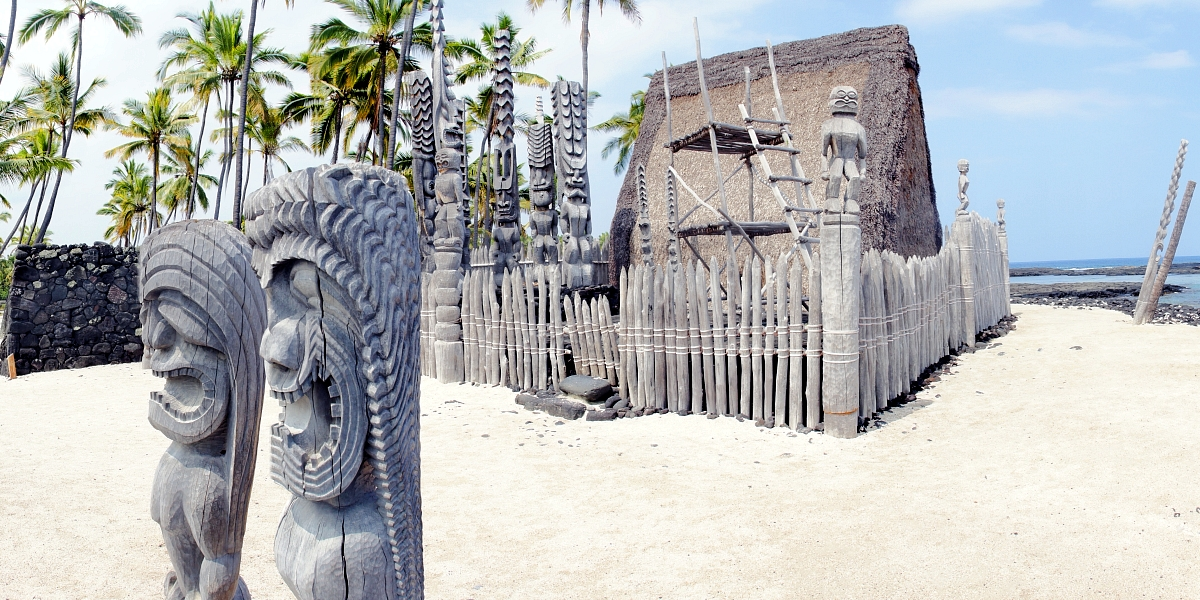 Остров Гвайи. Иллюстрация Второва И.П. для учебника Гавайеведение.